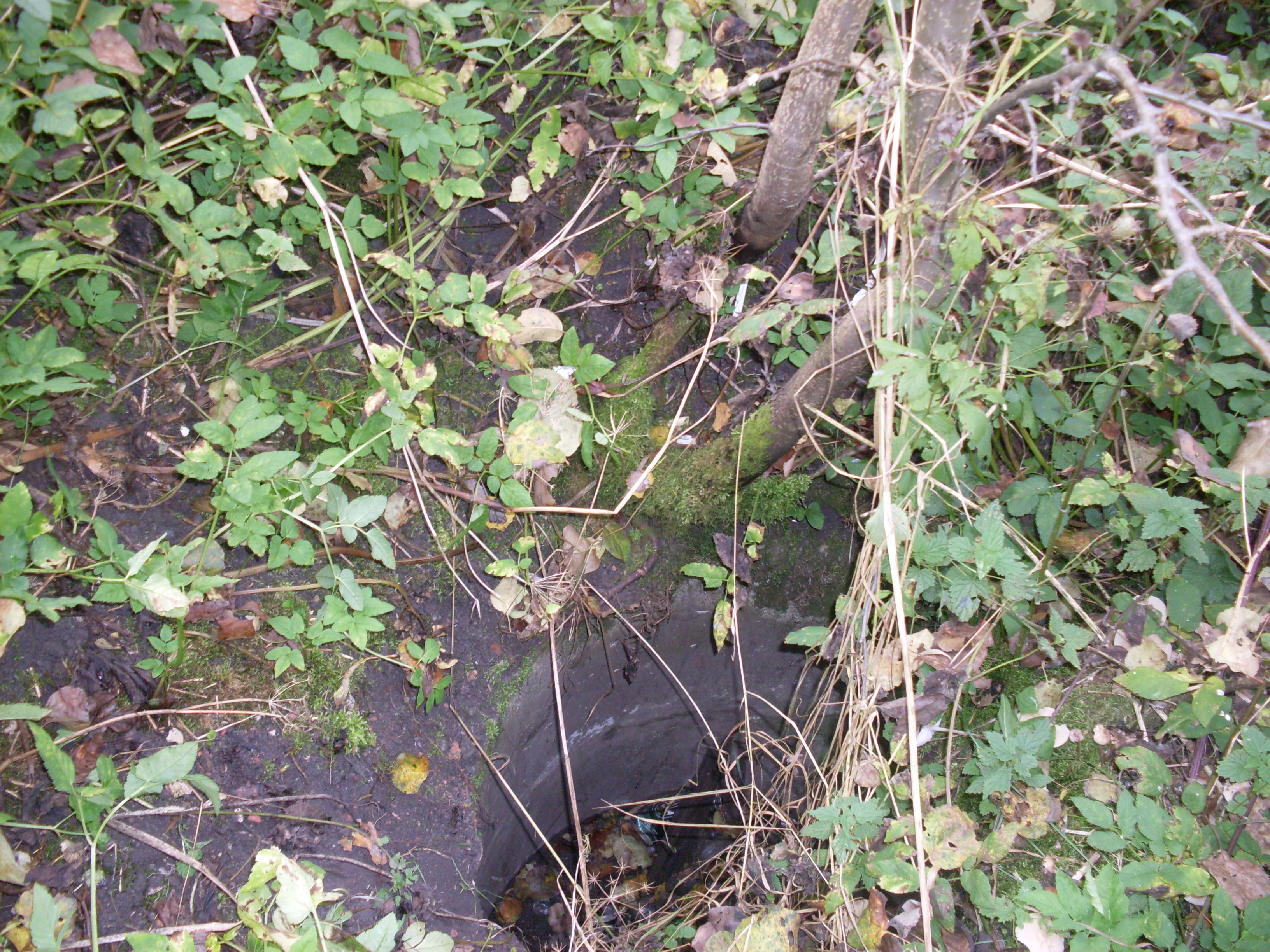 Tenczynek.Szyb Robert (KW.Kmita)